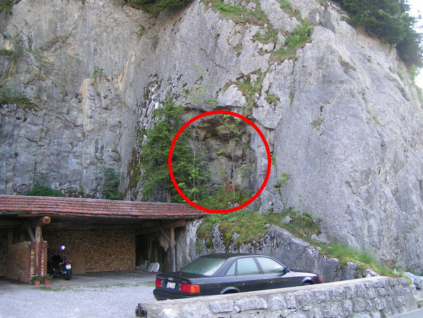 Getarnte Schiessscharte von der verbunkerten Sperre Jaun : A01745 Infanteriewerk Jaun – Sperre Jaun – R Br 21